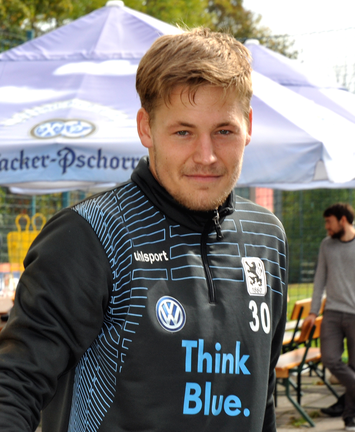 Vitus Eicher